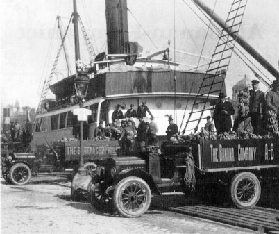 Banan-Kompaniet vid Nybokajen i Stockholm ca 1925